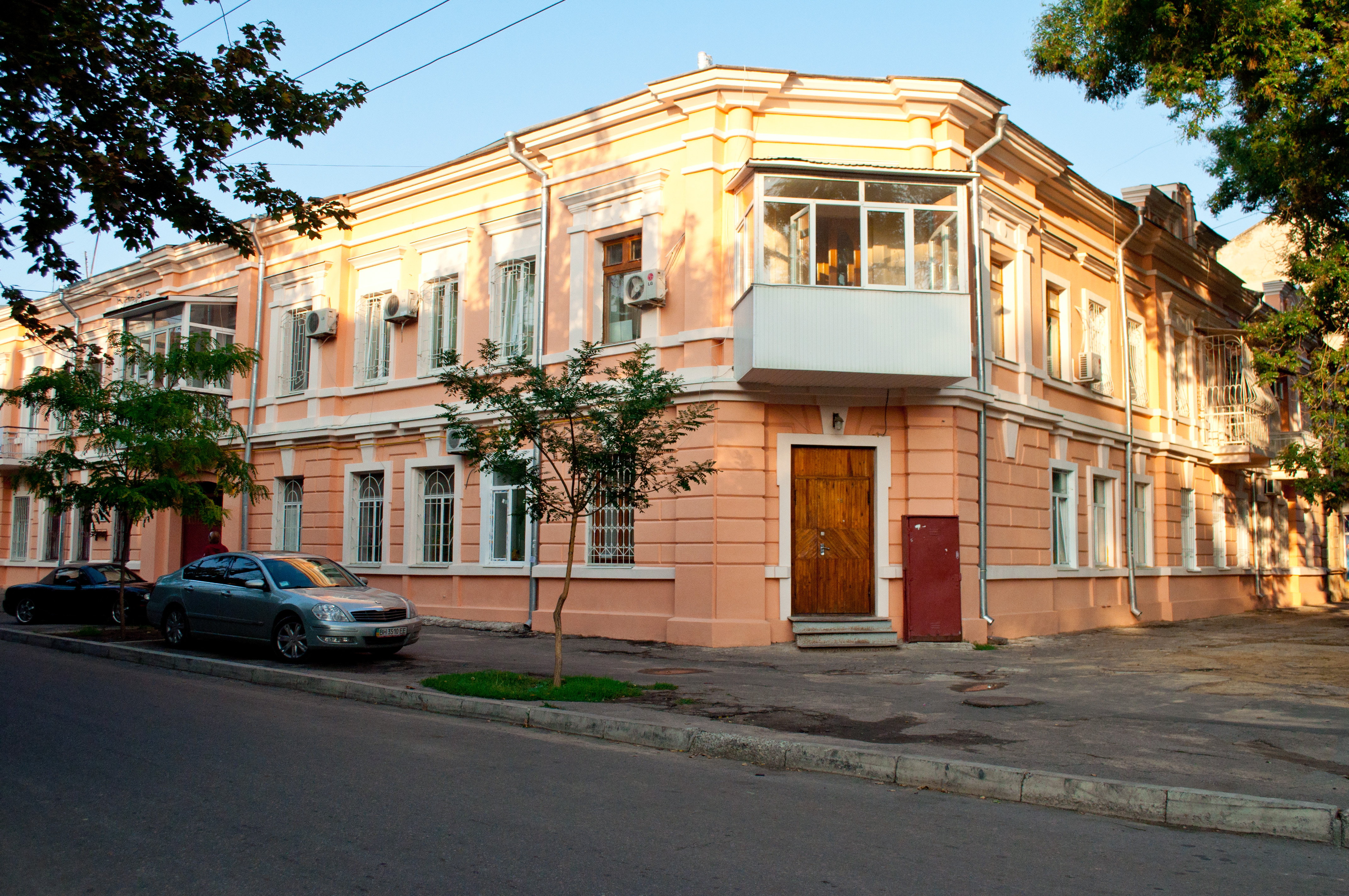 Будинок, де народився і жив Л.О. Утьосов - актор, співак